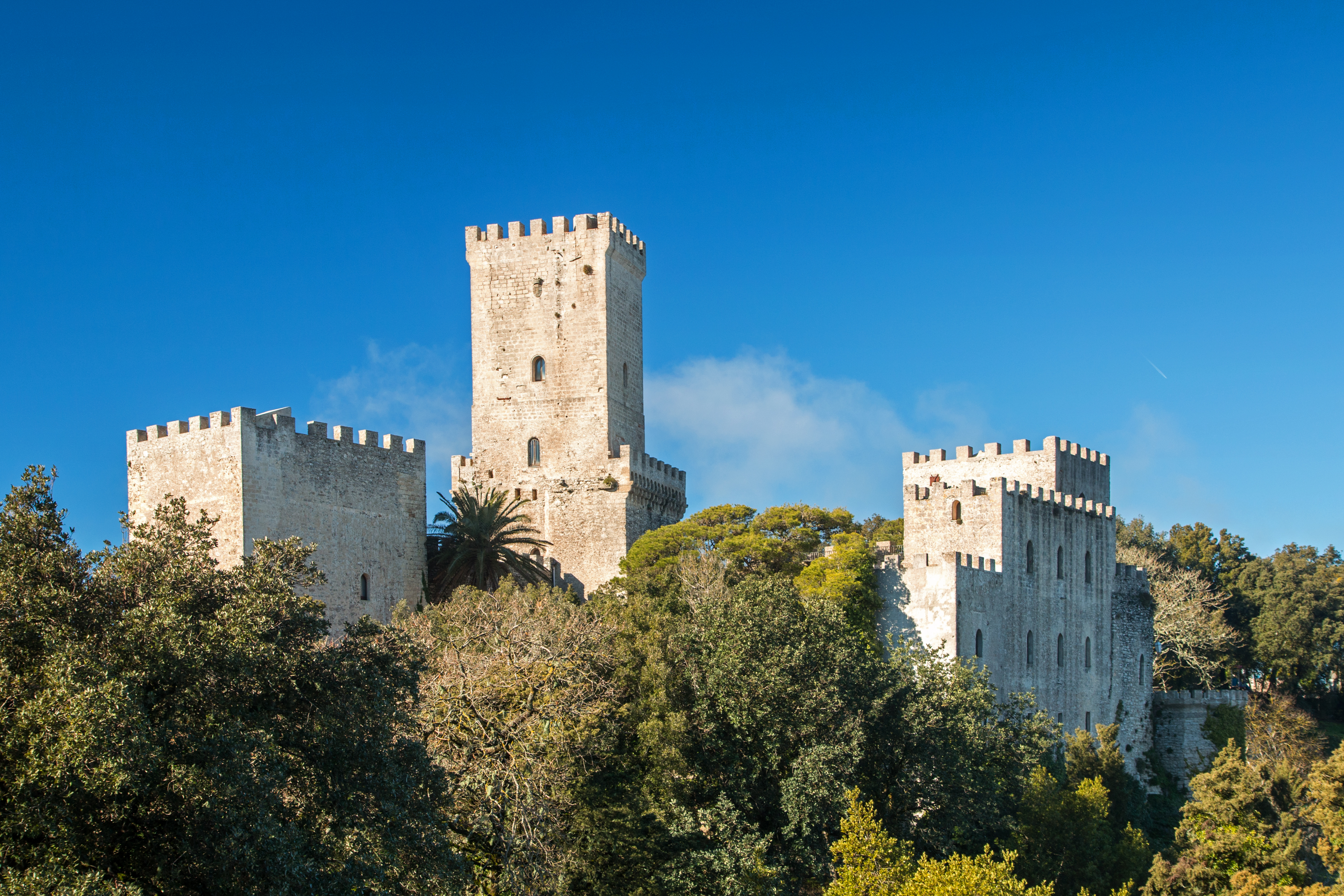 Erice